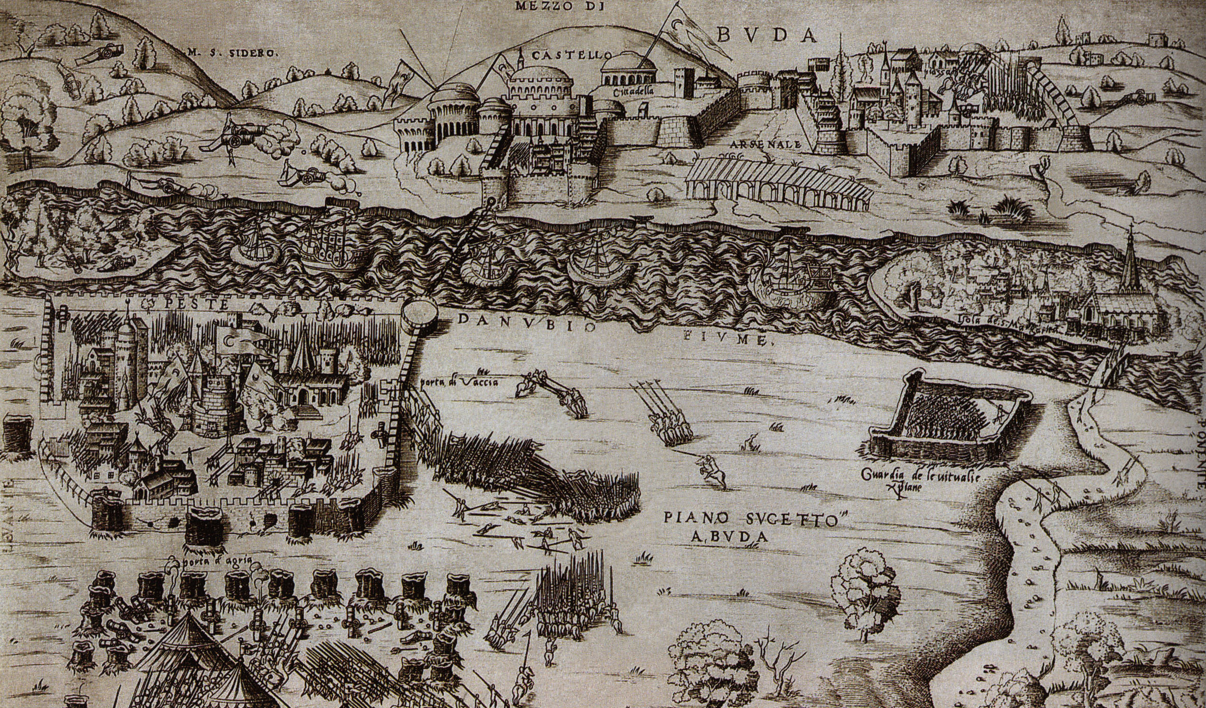 Buda és Pest látképe az 1542-es ostrom idején. Enea Vico rézmetszete. Érdekes a lánc a Duna felett